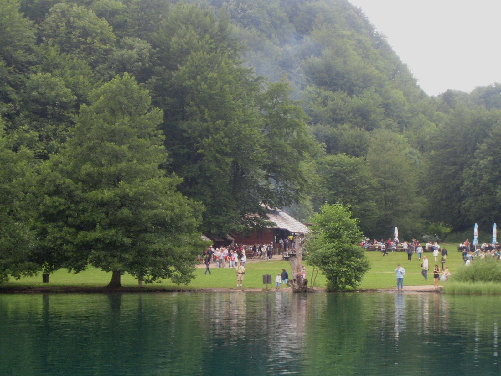 Parque Nacional Plitvice, Croacia.